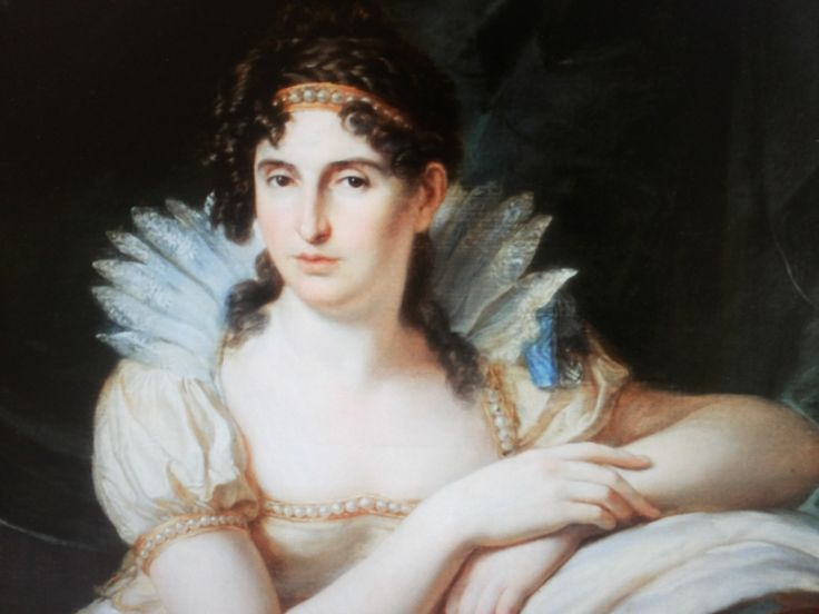 Графиня Александра Андреевна Шувалова (1775-1847), в замужестве княгиня фон Дитрихштейн.